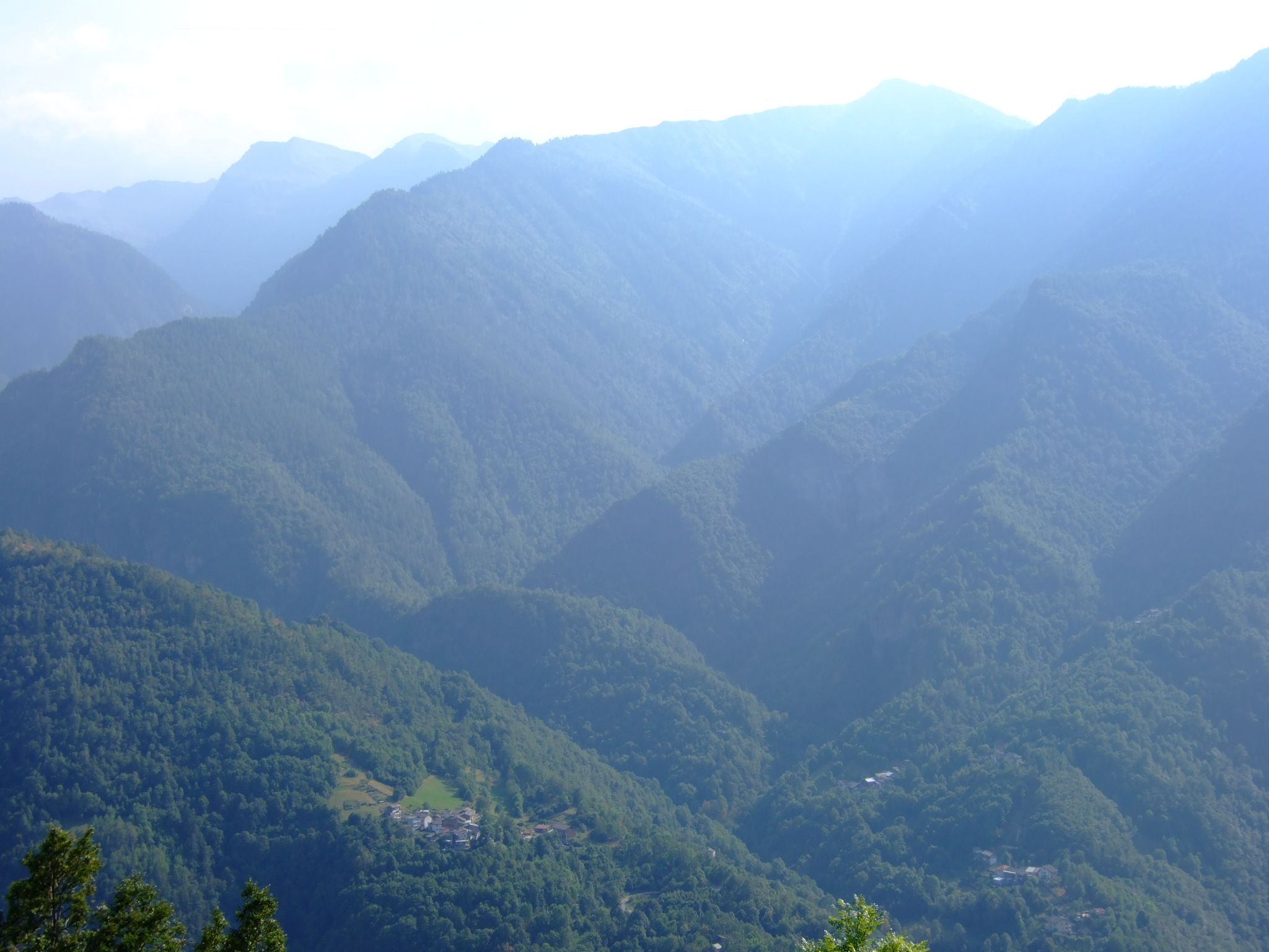 Les hameaux de Serre et Pian Faetto vus depuis San Martino